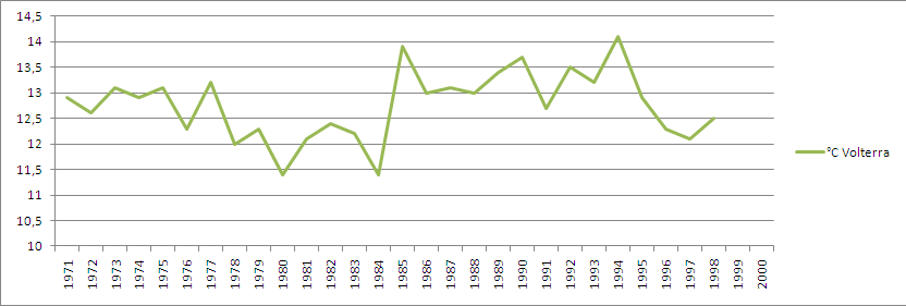 Stazione meteorologica di Volterra: andamento della temperatura media annua dal 1971 al 2000.